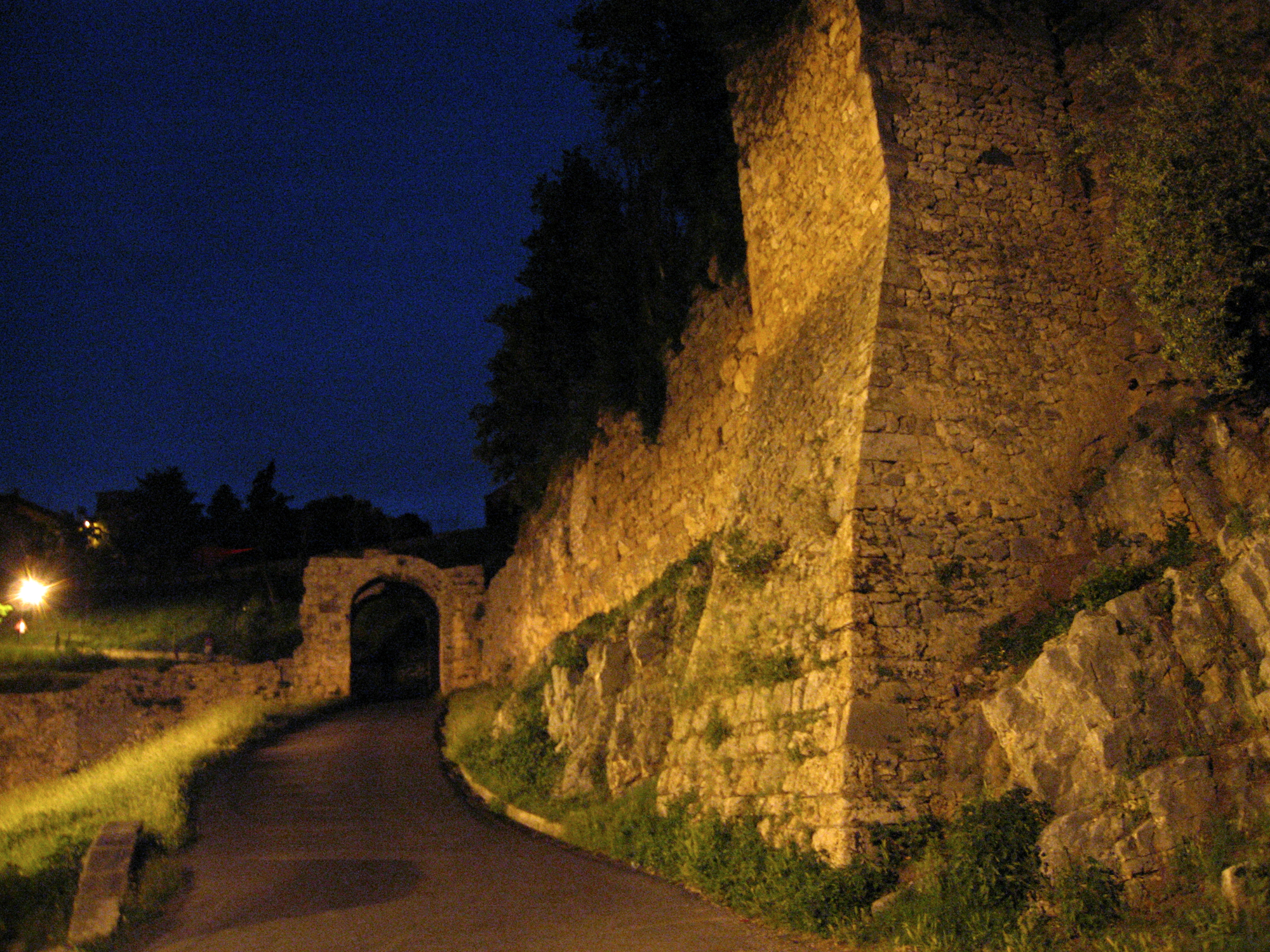 Archi di Casamari (Porta Maggiore) - Ferentino - notturno